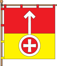 Хоругва села Нова Вижва